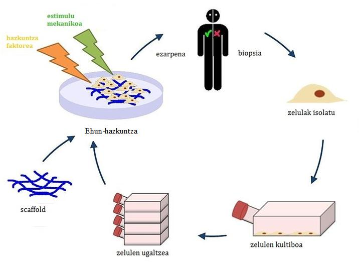 ehun-ingeniaritzaren oinarria